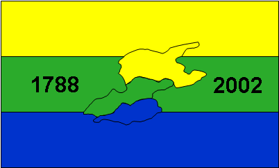 Bandera del municipio Sifontes, estado Bolívar, Venezuela